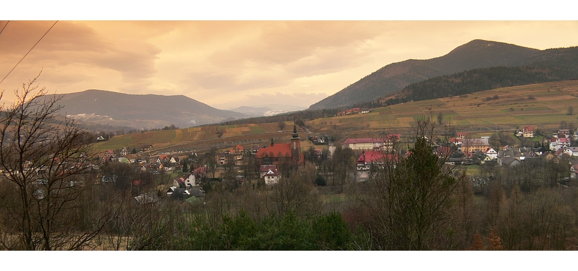 Panorama Lubnia